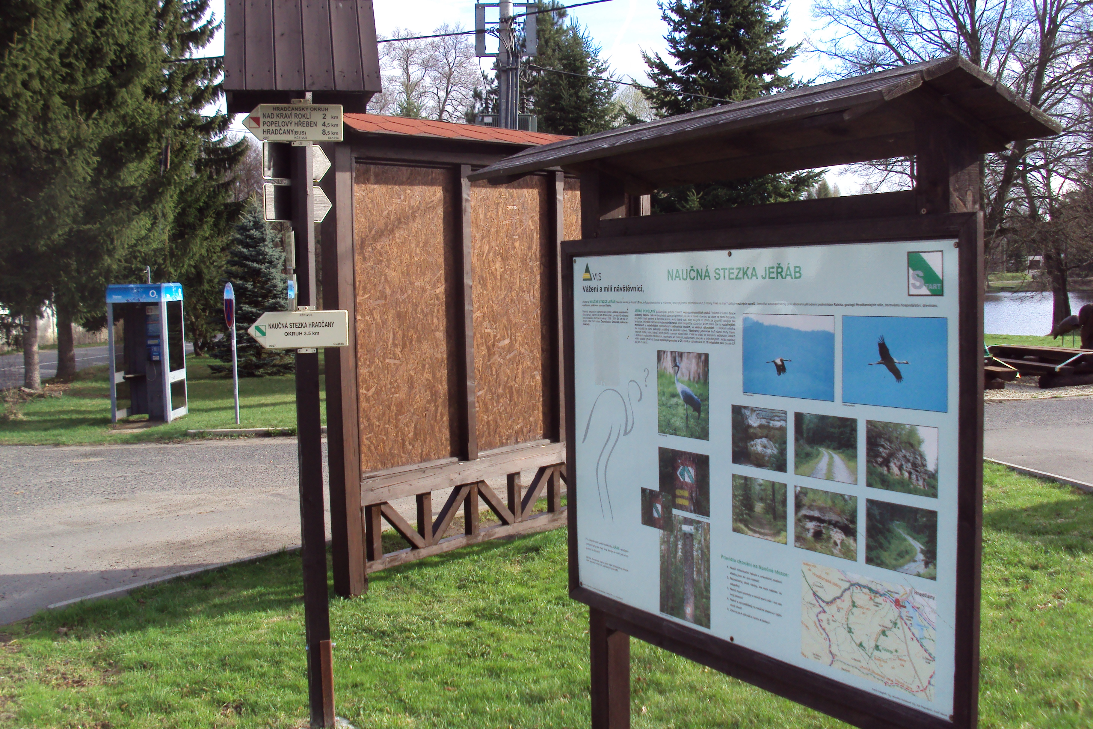 Tabule naučné stezky Vojenských lesů ve středu obce Hradčany